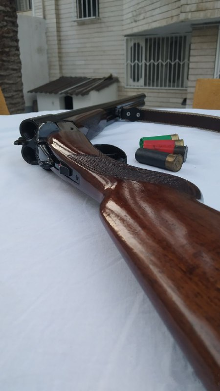 نخجیر 2 دولول ساچمه زنی ساخت ایران